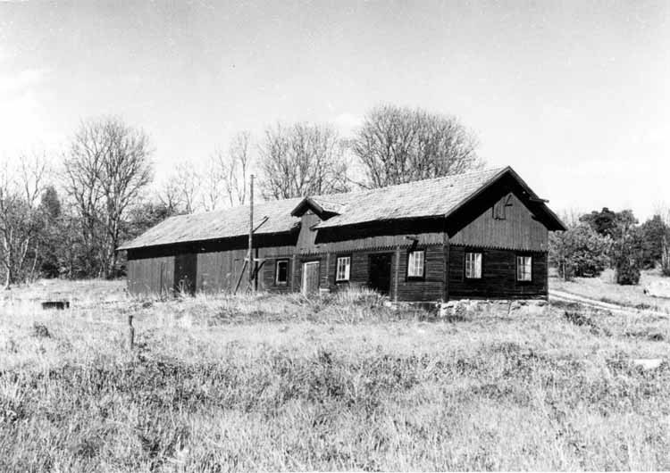 Ålsta gård, Järfälla kommun, Stockholms län. Uthusbyggnad tillhörande Ålsta med ladugård, stall och loge.